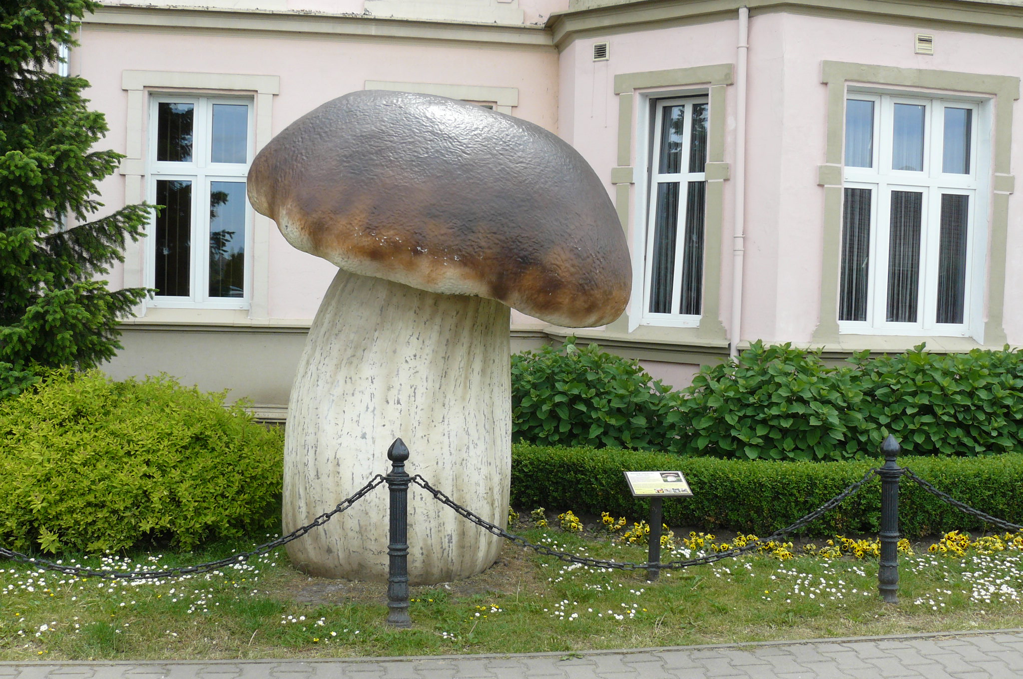 Pomnik grzyba w centrum Drawska.